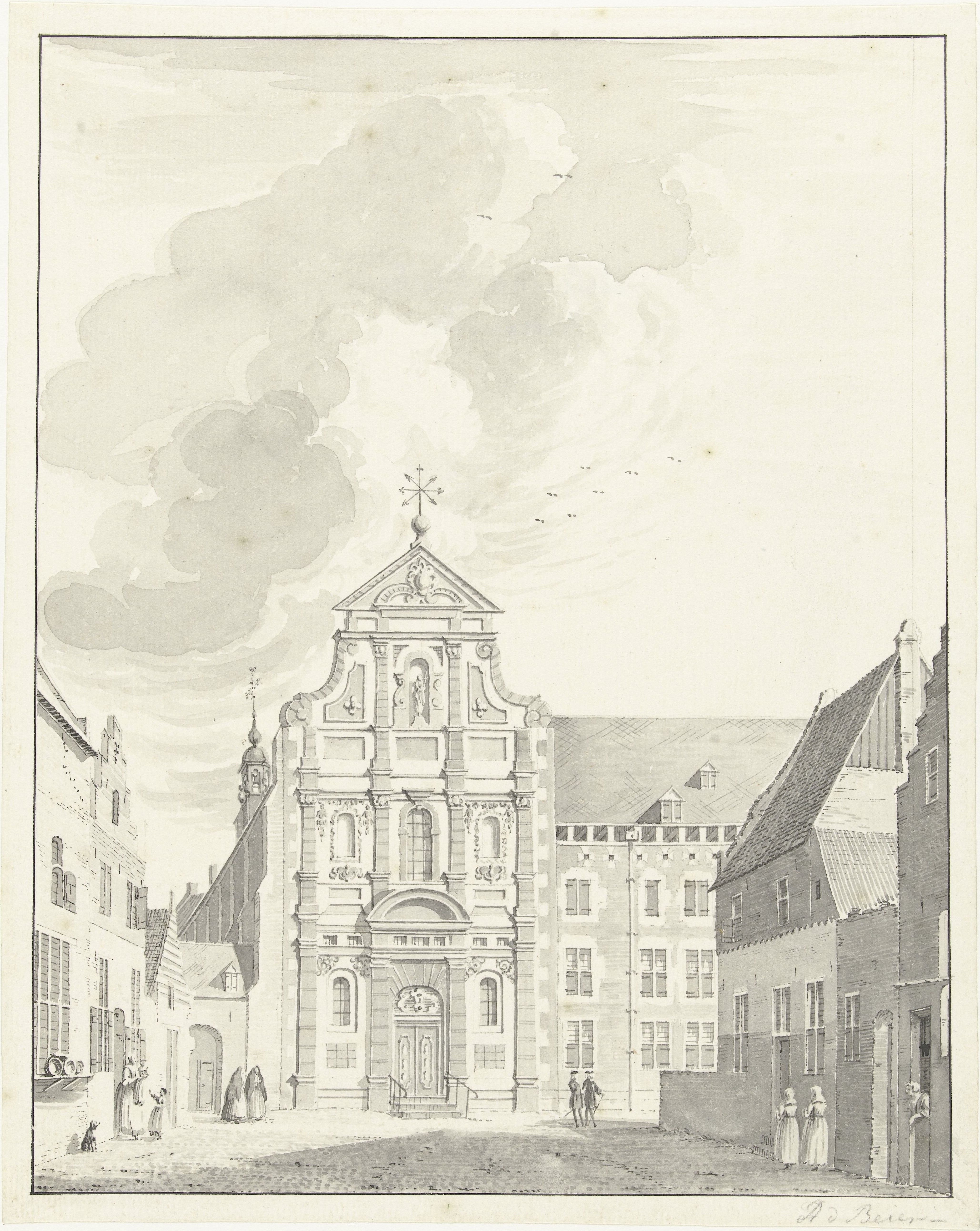 Gezicht op de kerk van het Ursulineklooster in Roermond gezien vanuit de Swalmerstraat.